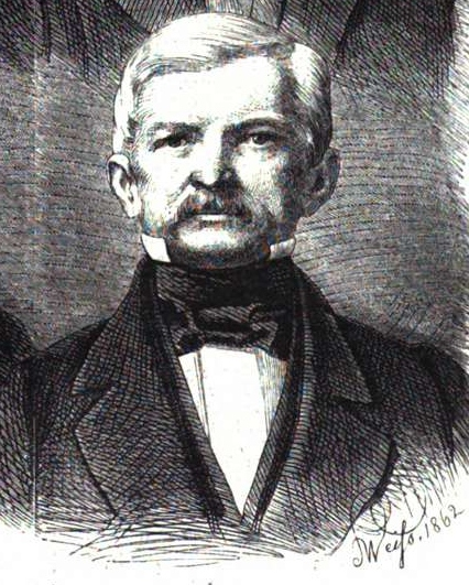 Hans-Hugo von Kleist-Retzow, preußischer Politiker im 19. Jh.